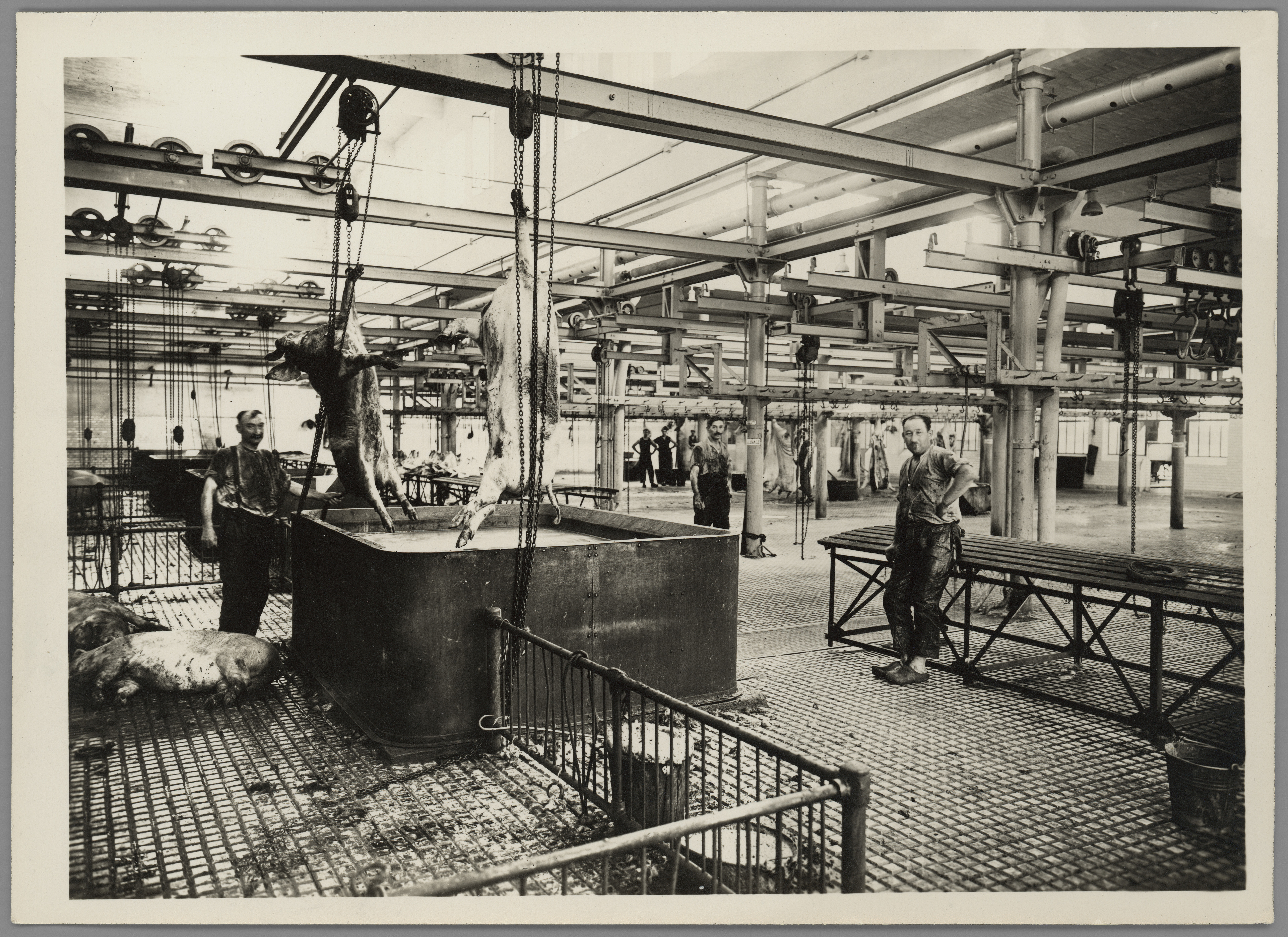 Photographie des abattoirs et du marché aux bestiaux de la Mouche. Cote 1108WP/4.